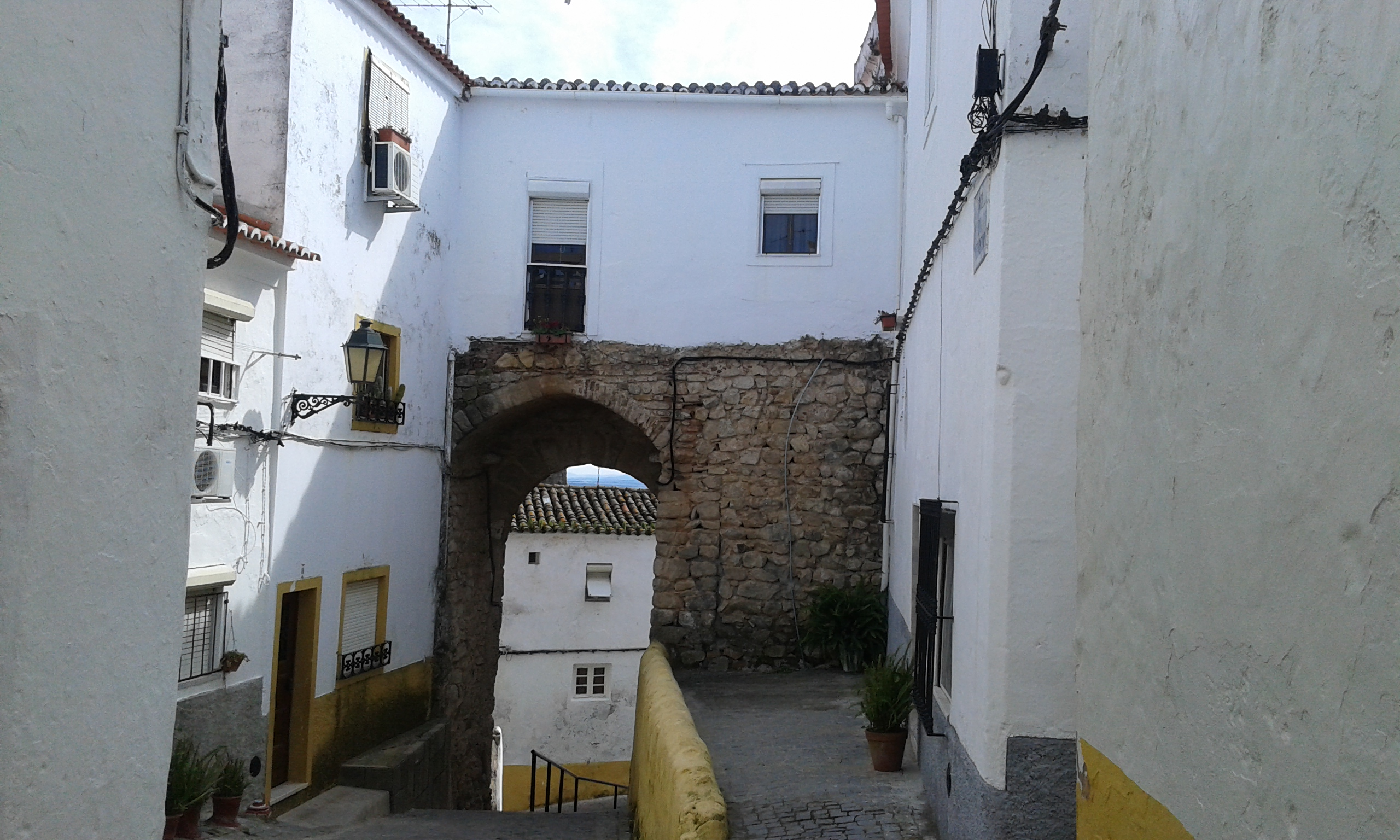 Vista traseira do Arco do Miradeiro.